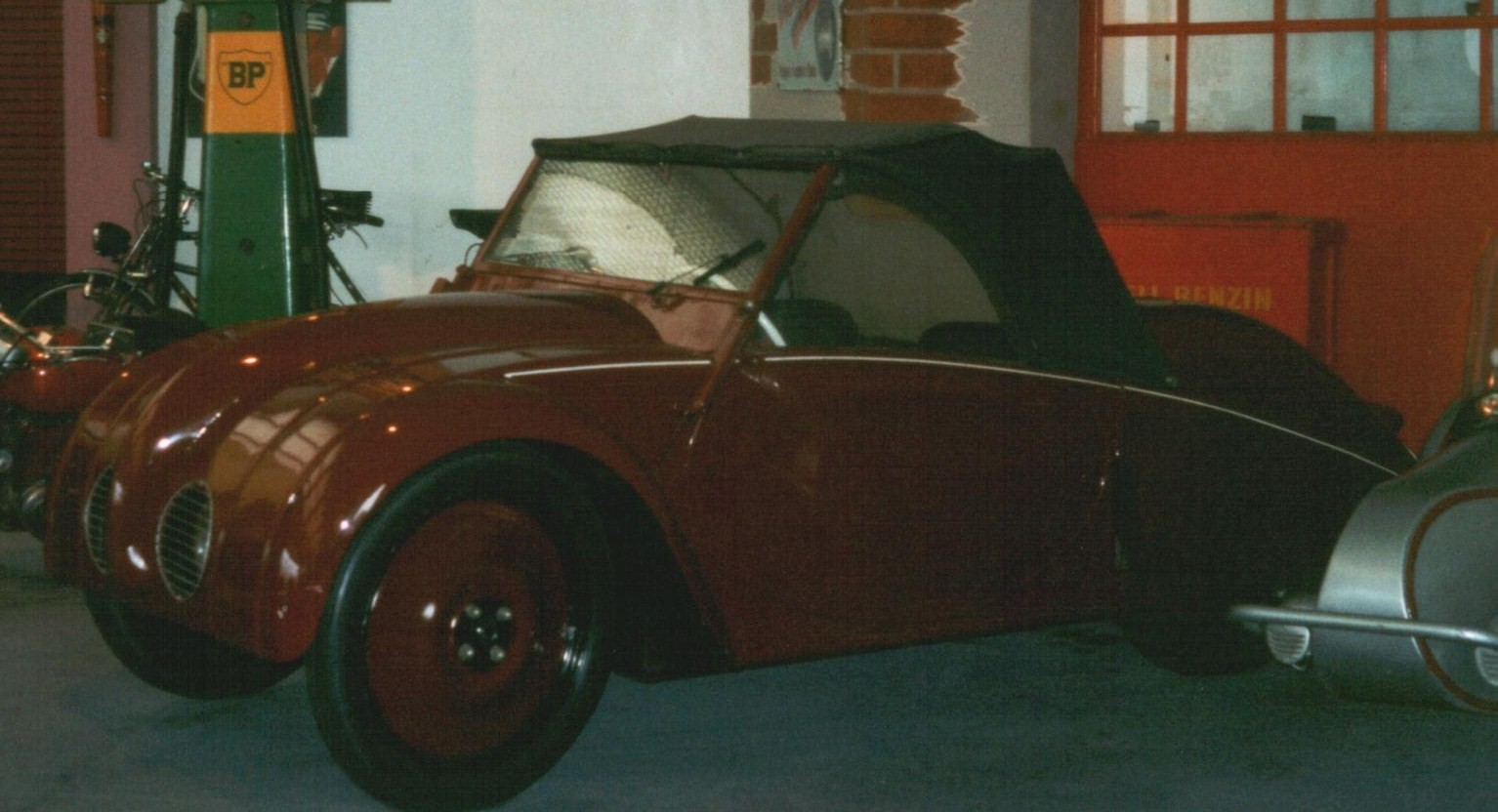 Rapid 1946